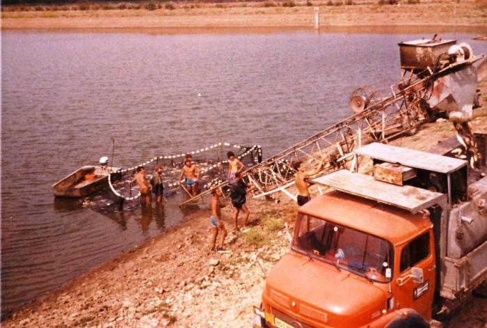 גן-שמואל - העמסת דגים למשאית בברכה 5 נפוליון 1979.